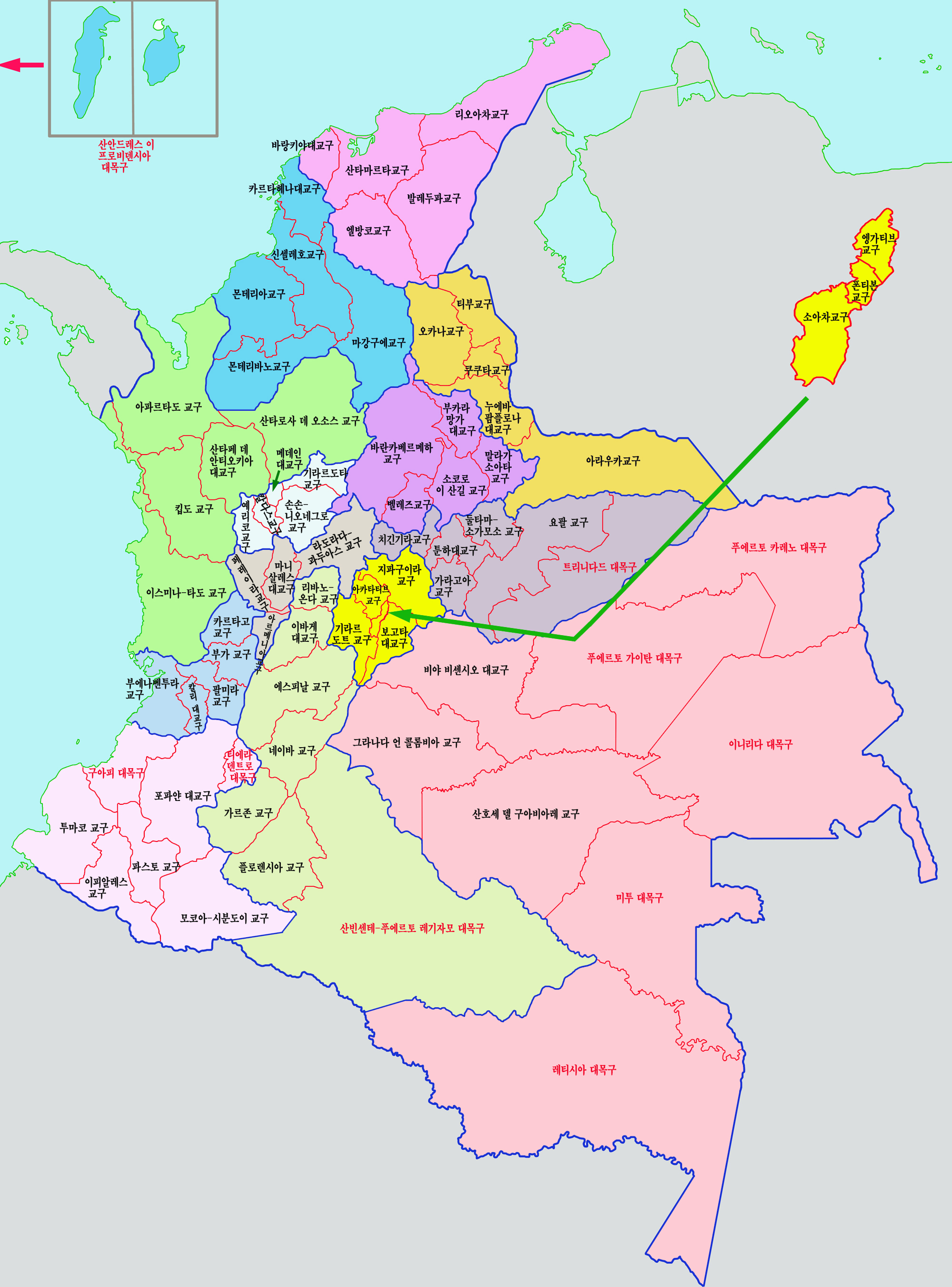 콜롬비아의 로마 가톨릭 교구도